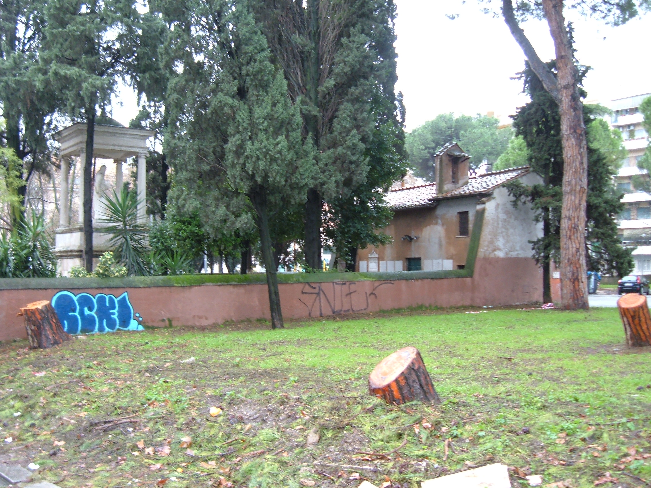 Oratorio di Sant'Andrea a Ponte Milvio, a Roma, nel quartiere Flaminio.